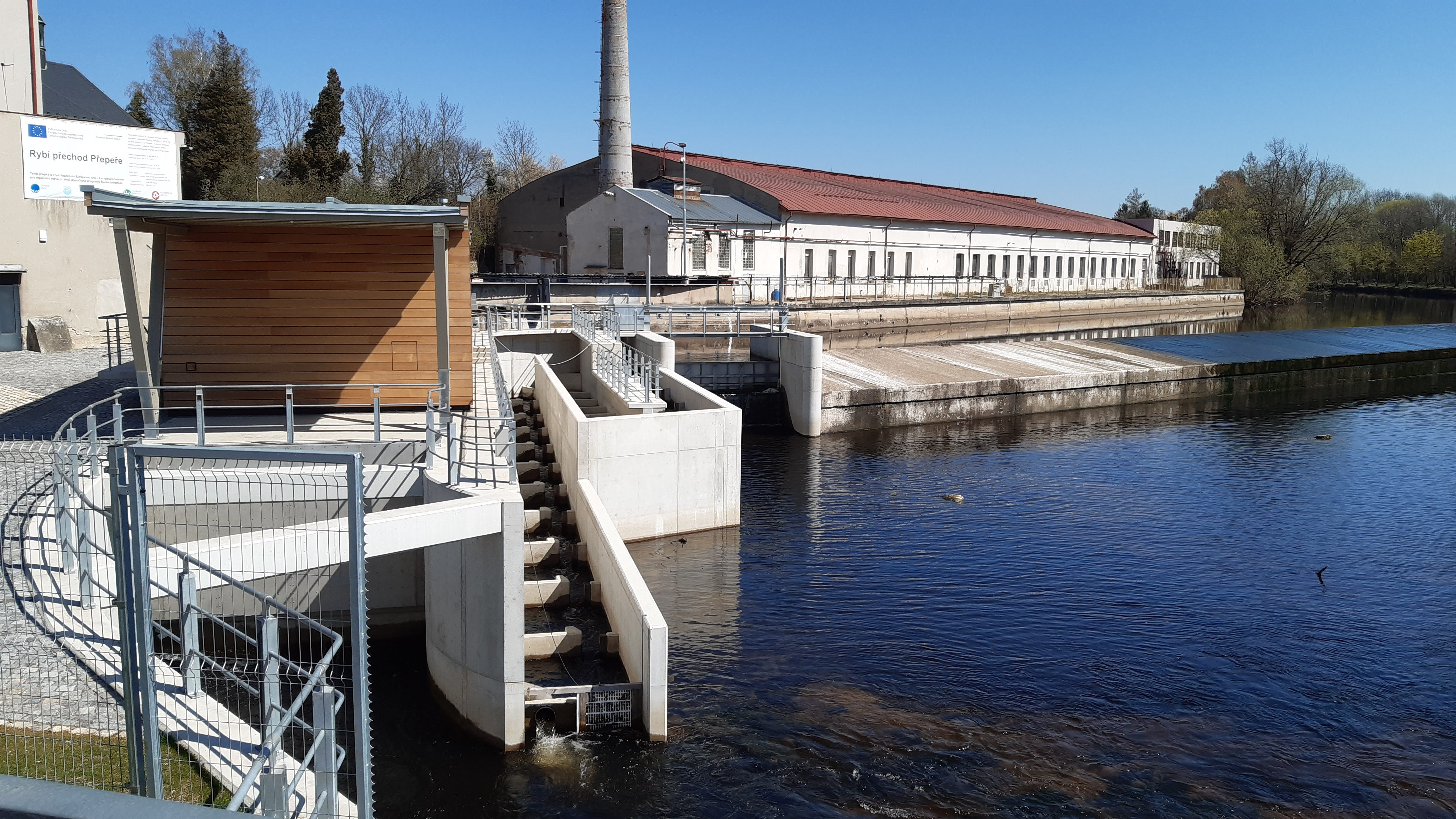 V roce 2019 byl dokončen nový rybí přechod a nová malá vodní elektrárna na jezu v Přepeřích.